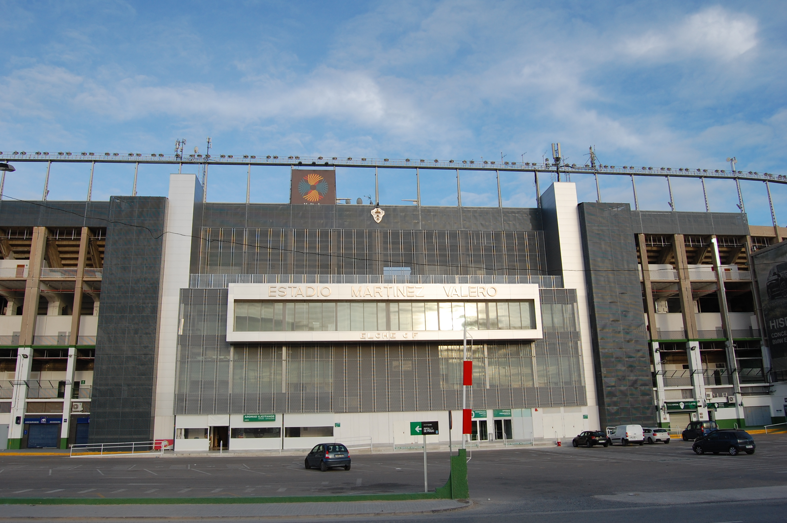 Nueva fachada del estadio